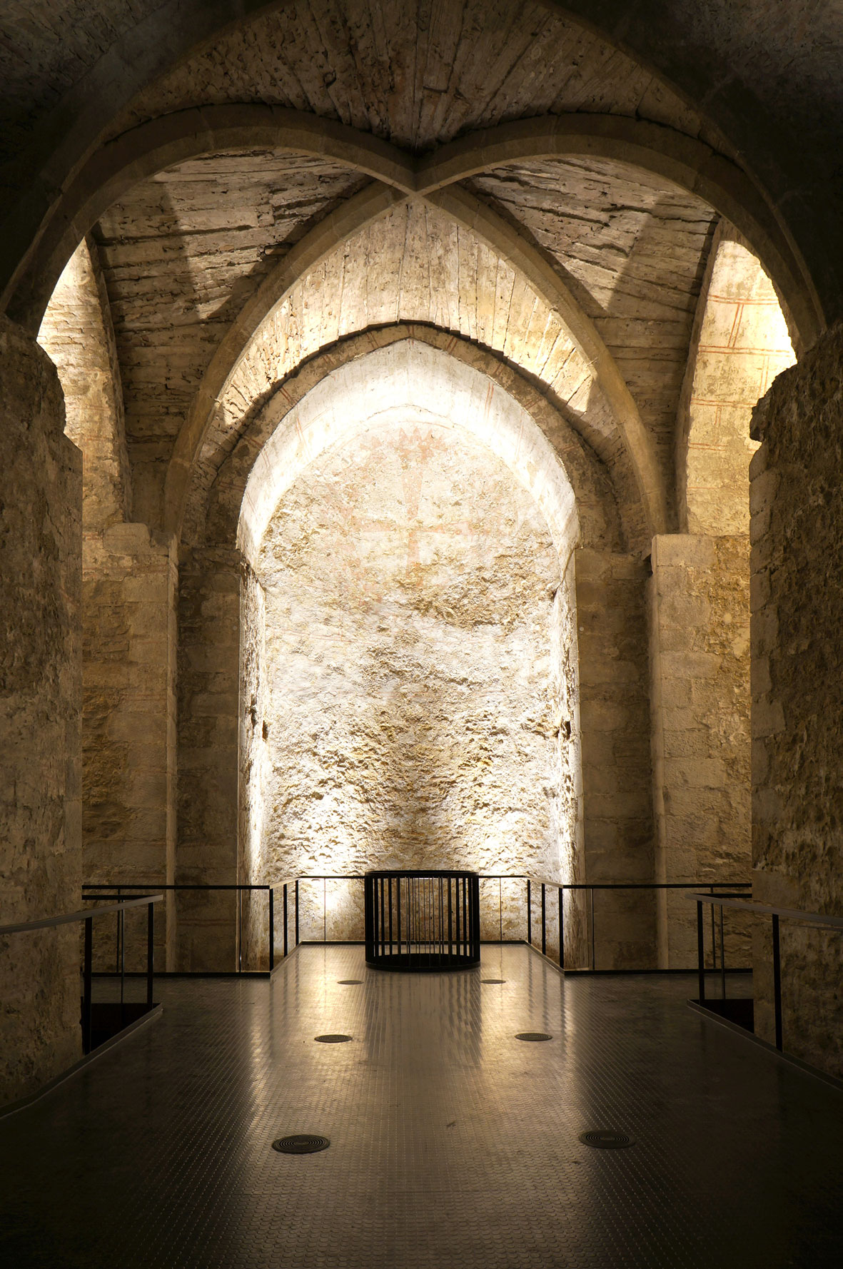 Ehem. Virgilkapelle, Magdalenenkapelle